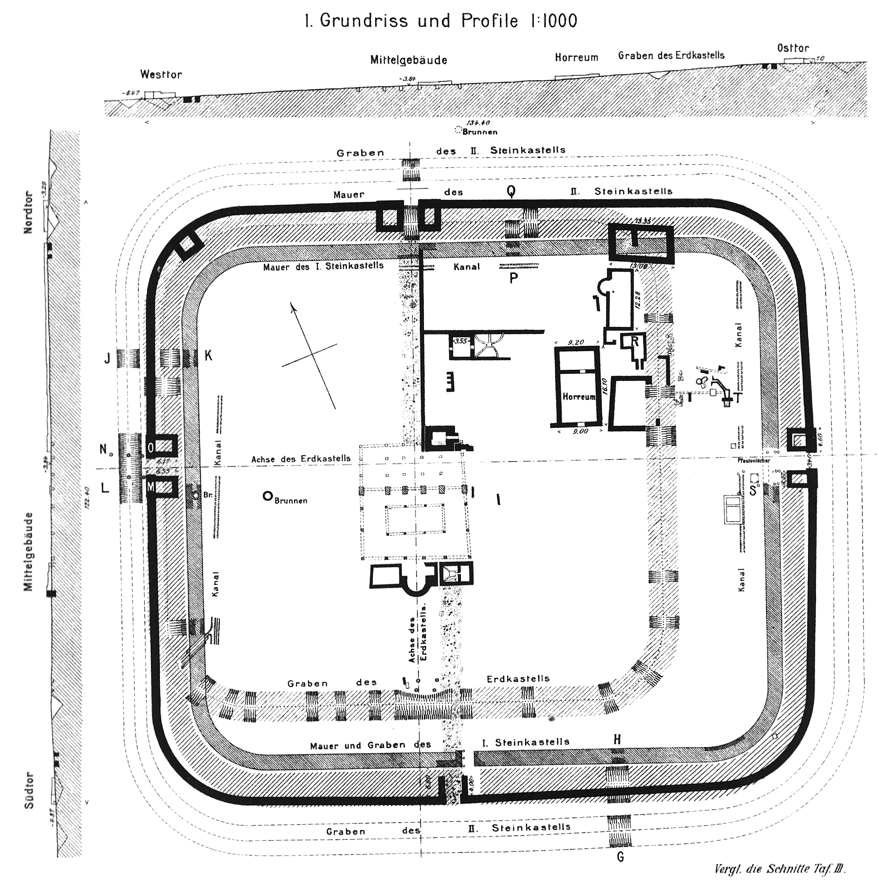 Grundriss und Geländeprofile des Kastells Kapersburg, ORL 12